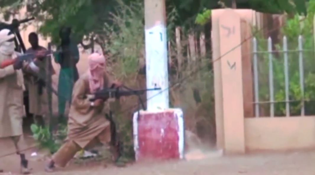 Djihadistes lors des combats à Gao, au Mali, contre le MNLA en juin 2012.